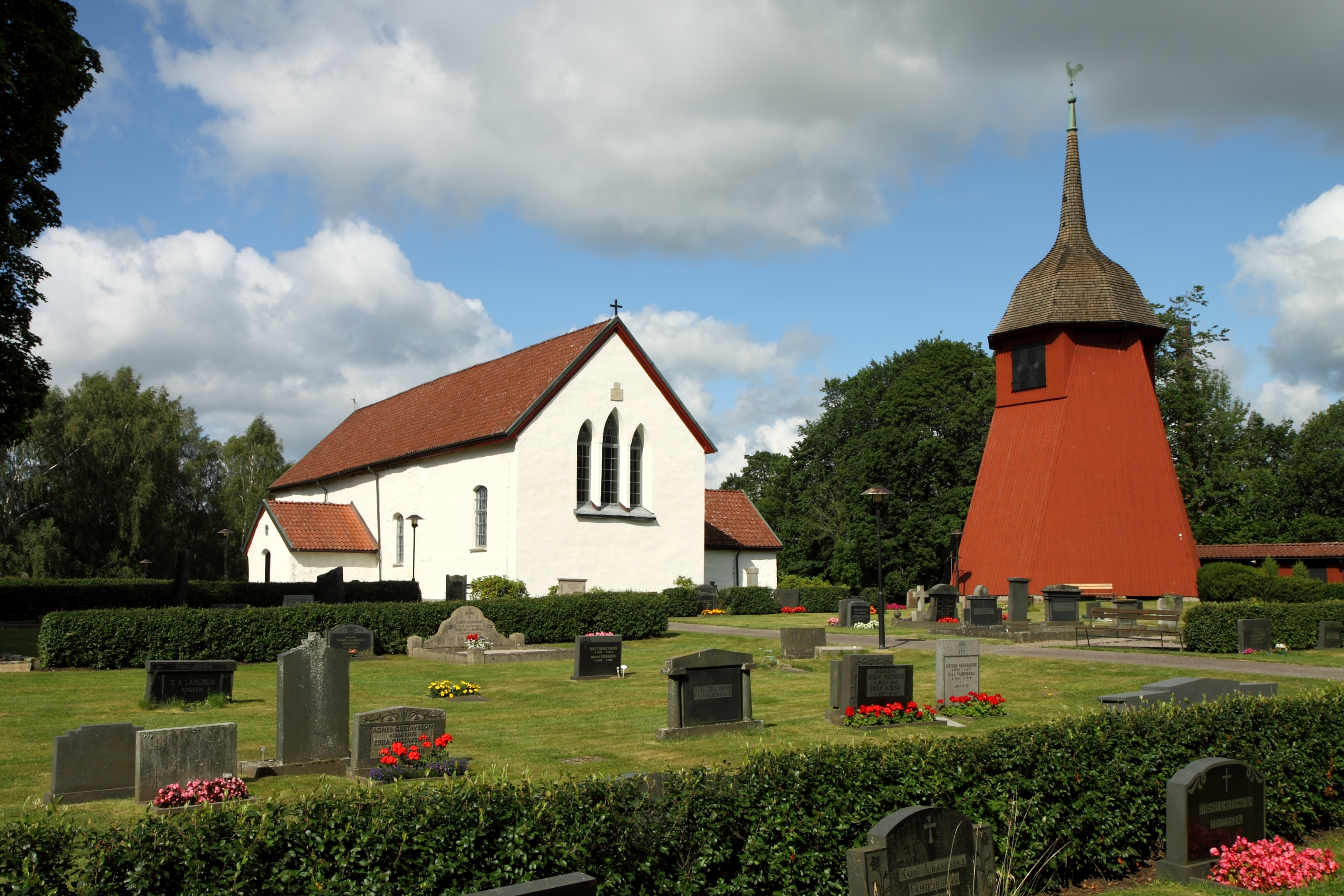 Timmele kyrka.